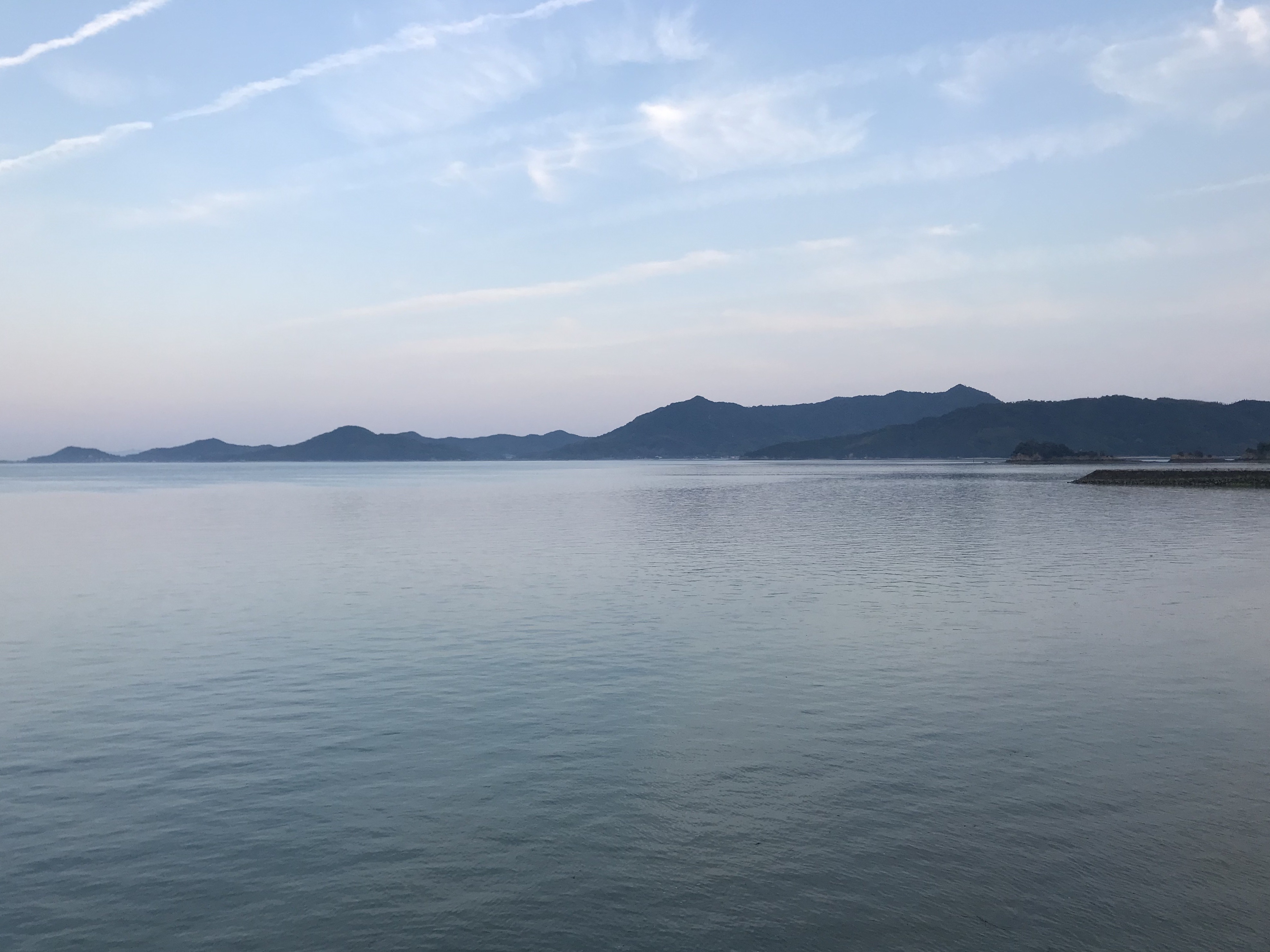 道の駅今治市多々羅しまなみ公園より望む伯方島